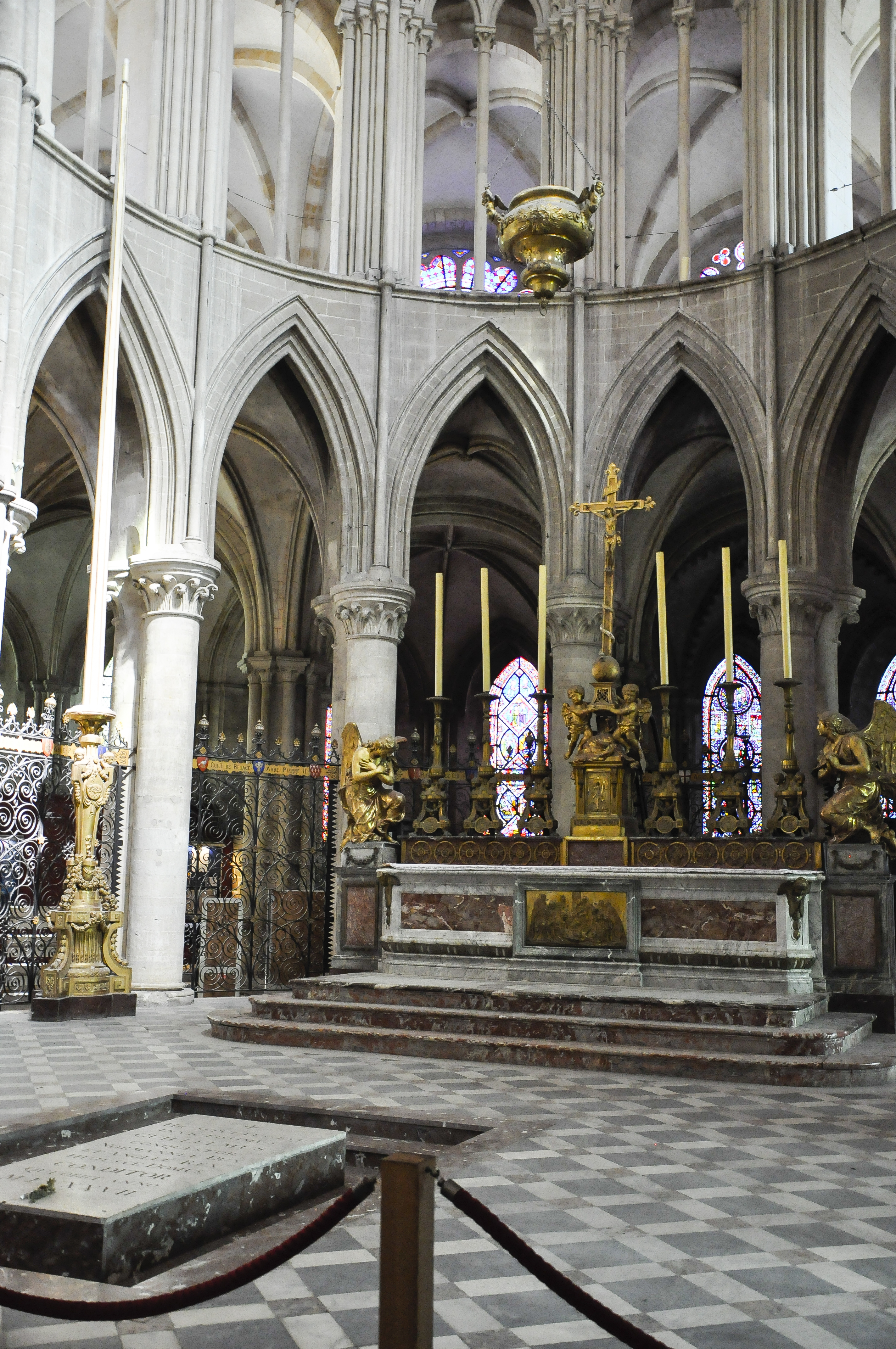 Het koor van de abdijkerk van de Abbaye aux Hommes, te Caen, met het graf van Willem de Veroveraar